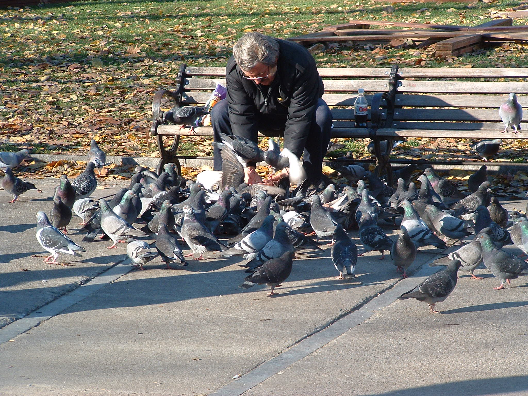 Pigeons